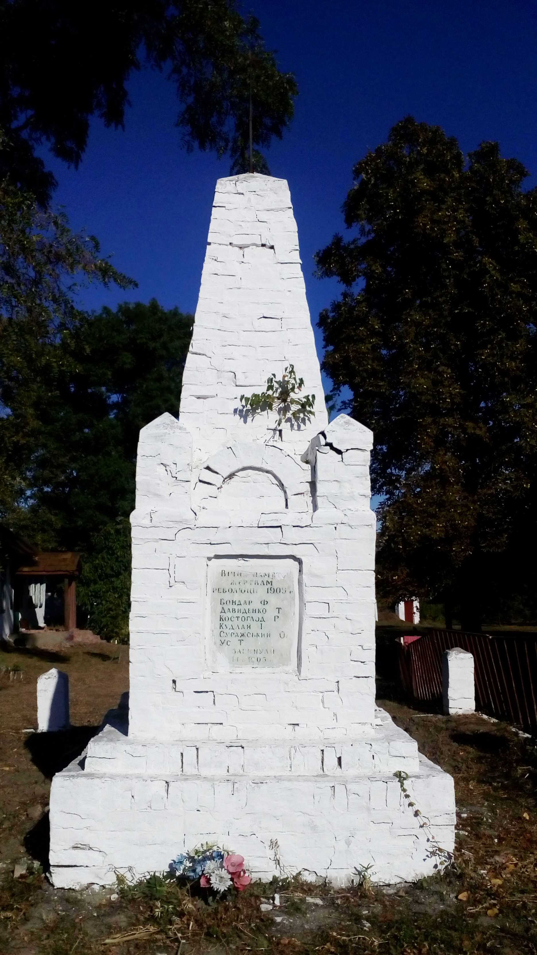 Братська могила 6 селян, розстріляних за участь у виступі проти поміщика 14 листопада 1905 р., Ольшана, територія школи